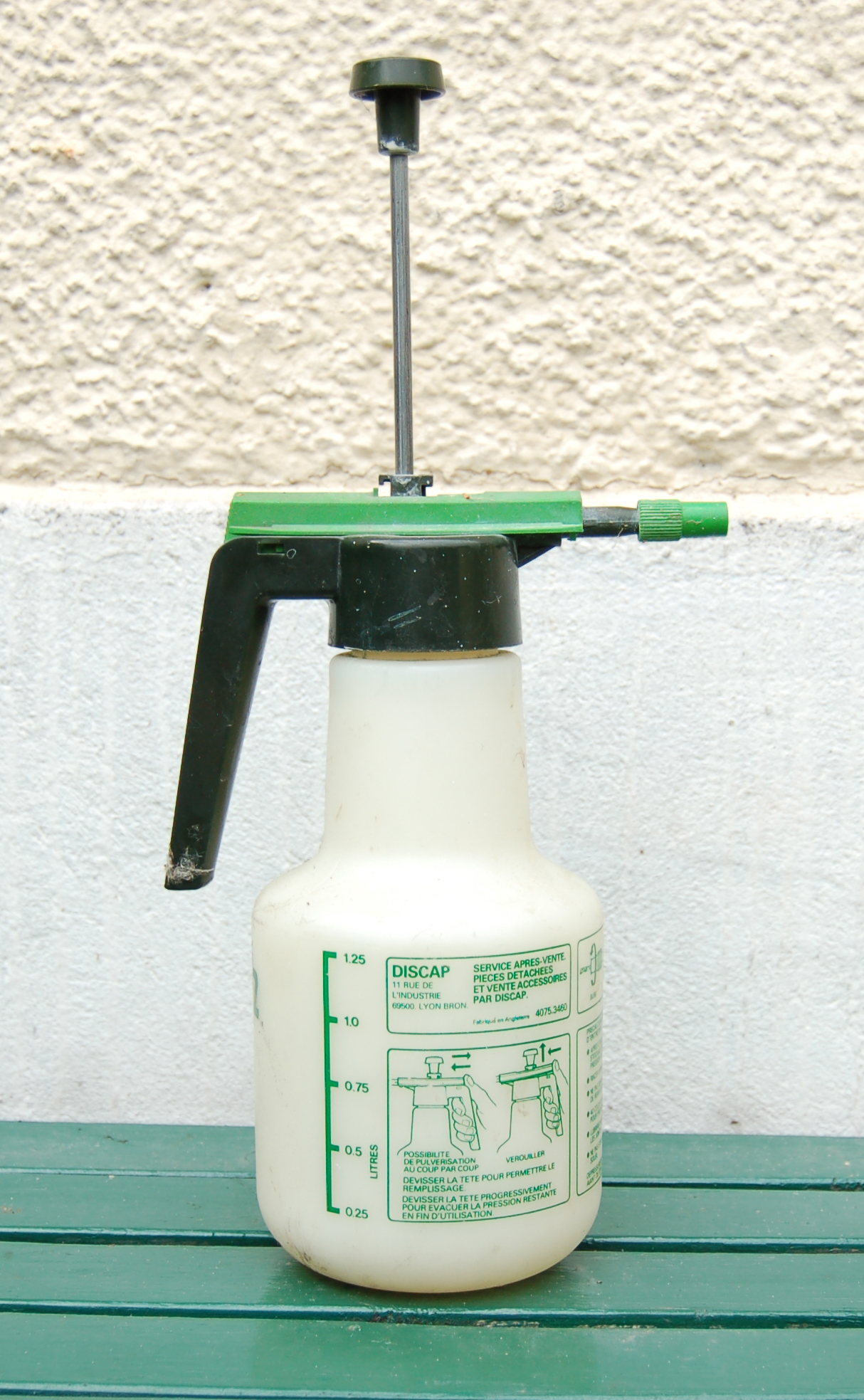 Pulverisateur - pulverizer